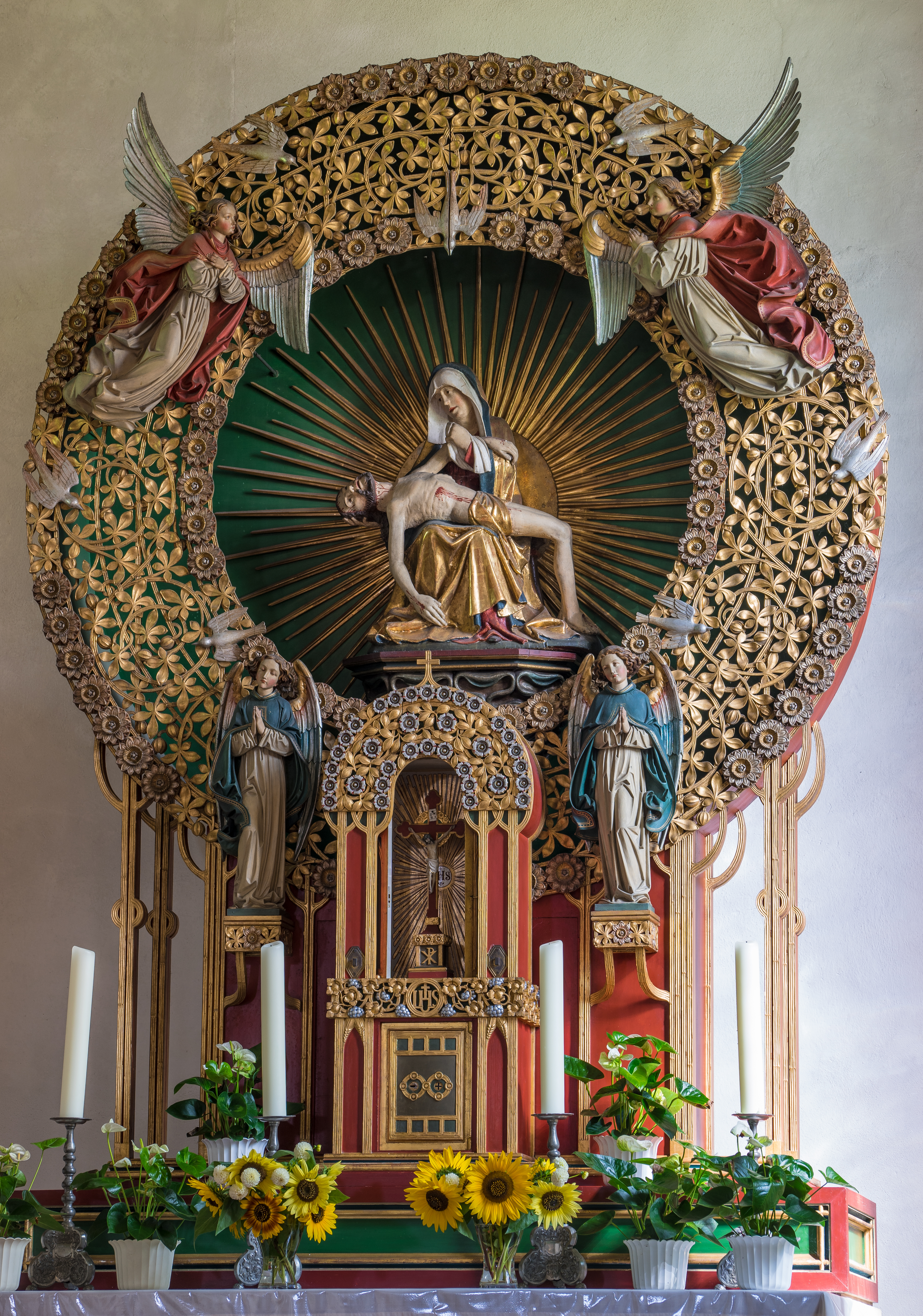 Schöntal (Hohenlohekreis), Wallfahrtskapelle Neusaß: Der 1906 geschaffene Jugendstil- bzw. Art-Deco-Altar von Theodor Schnell dem Jüngeren (1870–1938). Im Zentrum eine spätgotische Pietà.